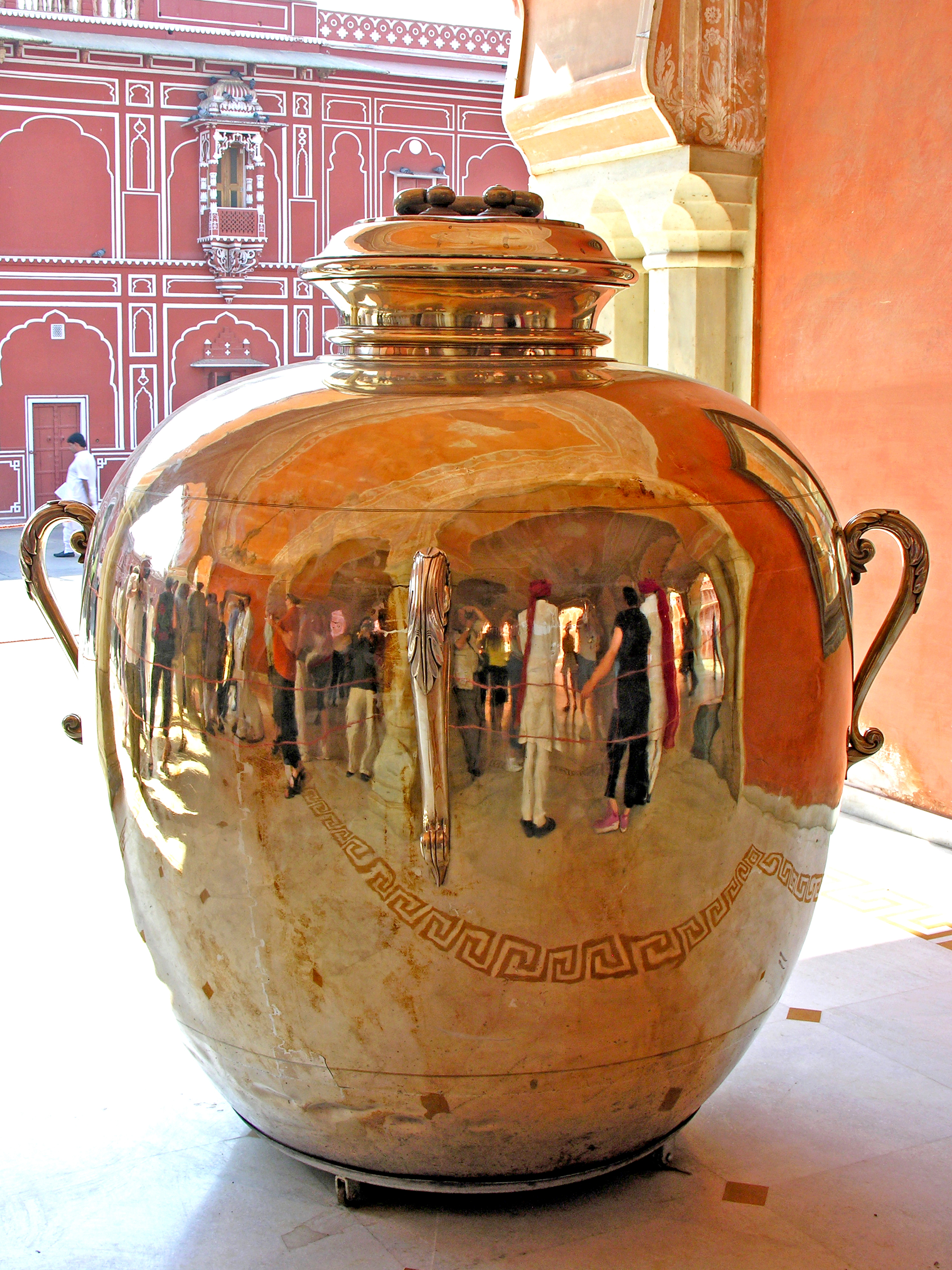 India-6802